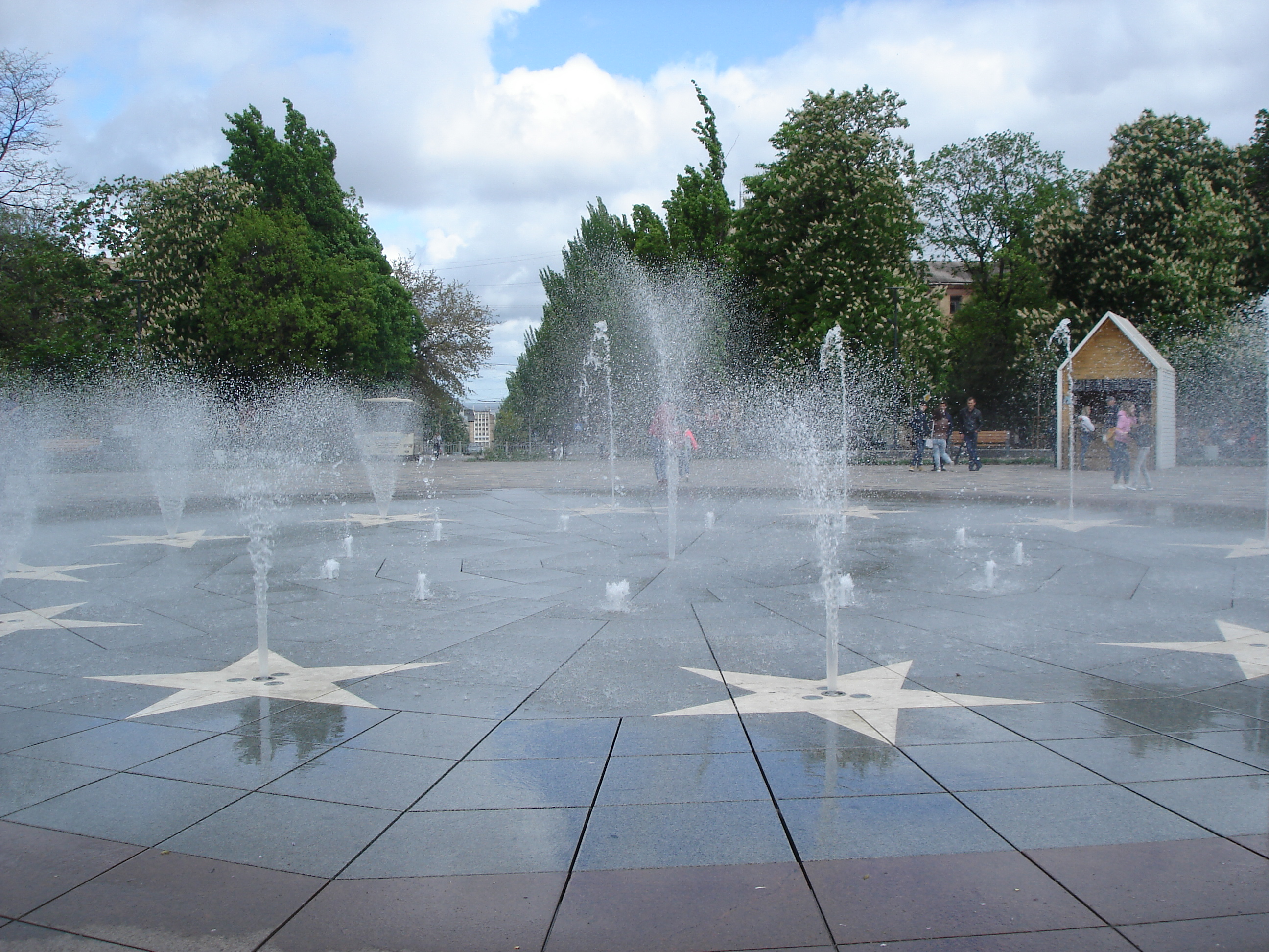 Театральный сквер 2019 год